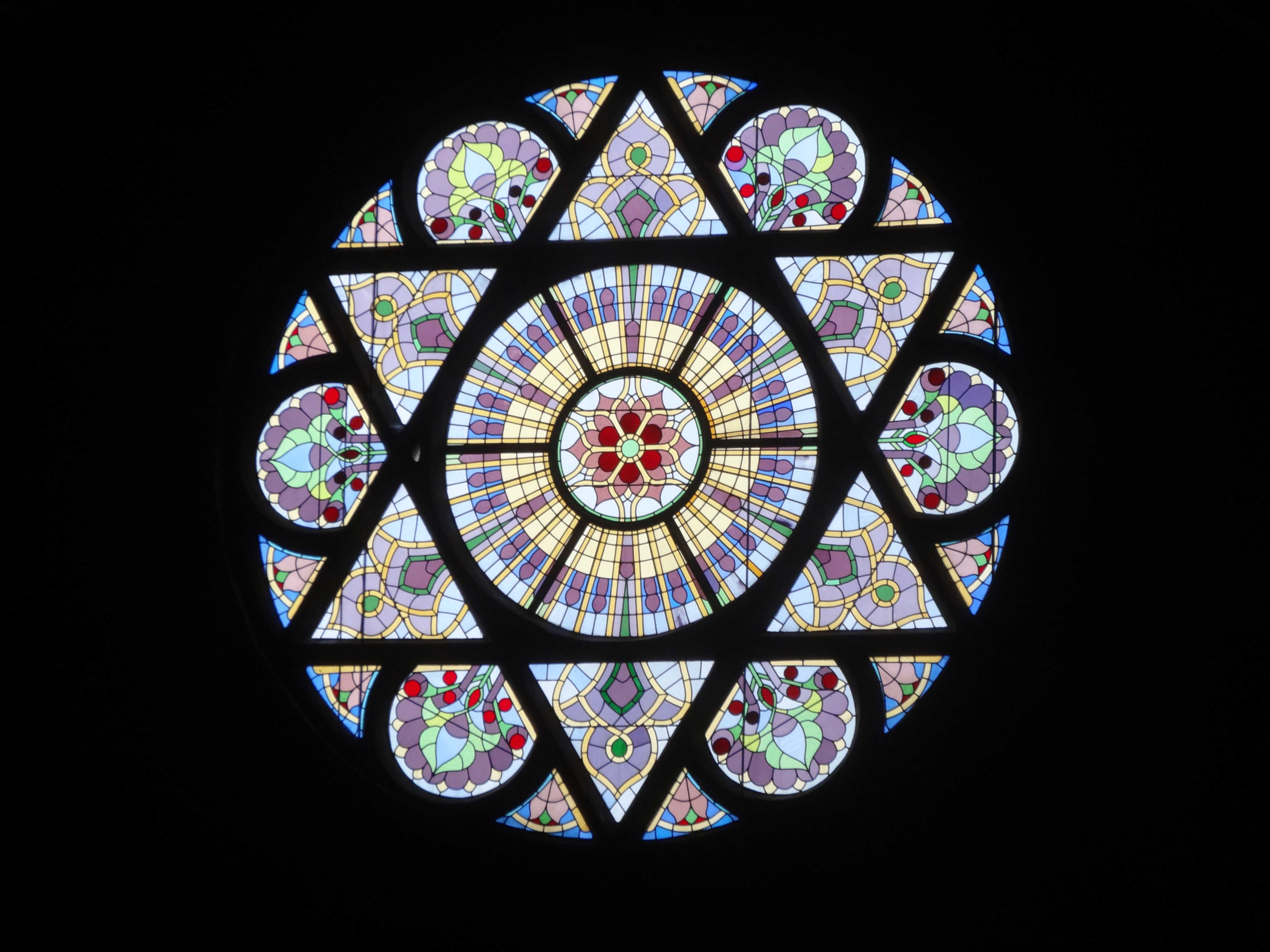 Synagoge Folkingestraat Groningen - glas in loodraam